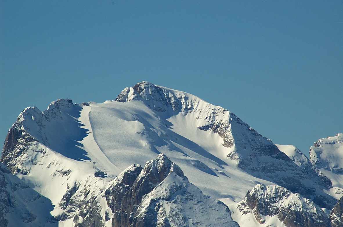 Marmolada